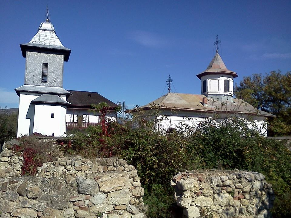 Curtea boierilor Bozianu